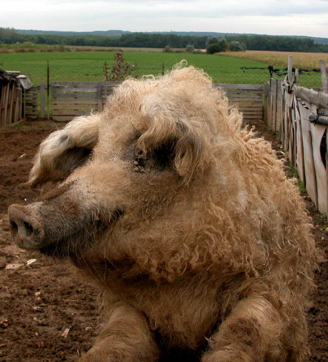 Egy Mangalicáról készült kép.